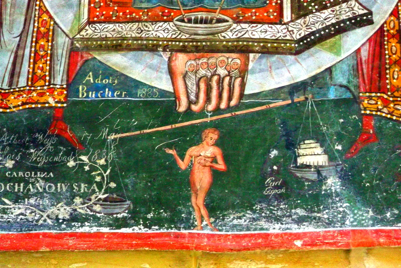 Watra Mołdowica (Vatra Moldoviţei), cerkiew, fresk